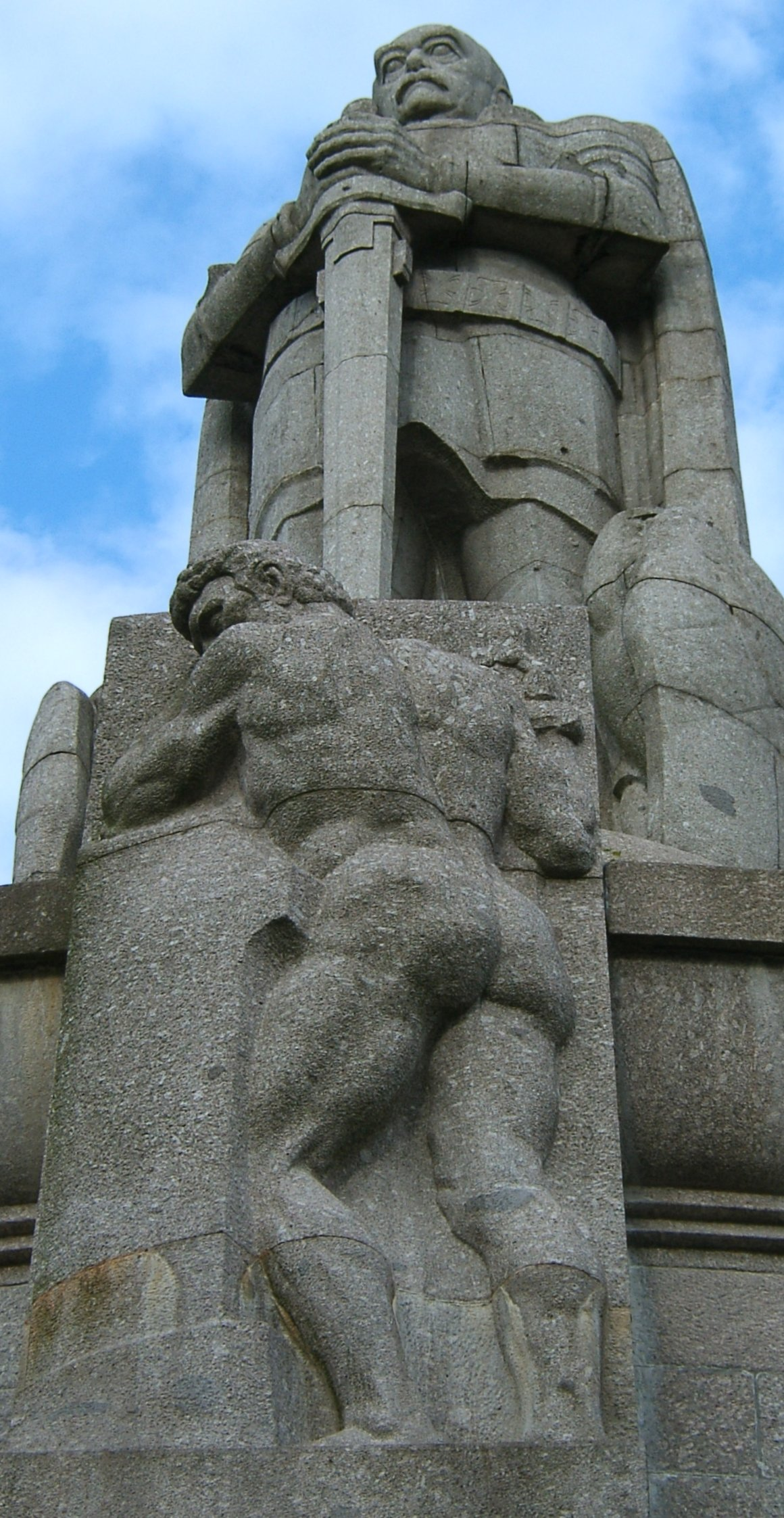 Athleten-Figur von Hugo Lederer am Bismarck-Denkmal in der Hamburger Neustadt.